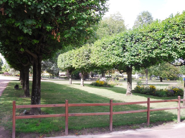 Le parc André Leblanc de Viry-Châtillon (91)